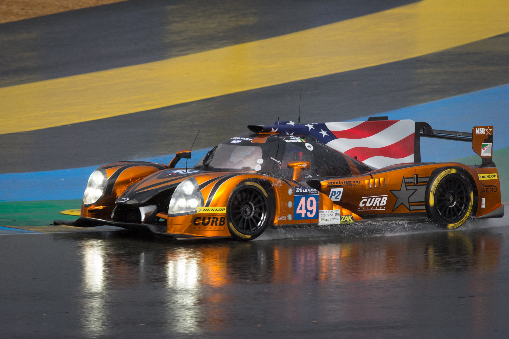 Drivers: John Pew, Oswaldo Negri, Laurens Vanthoor